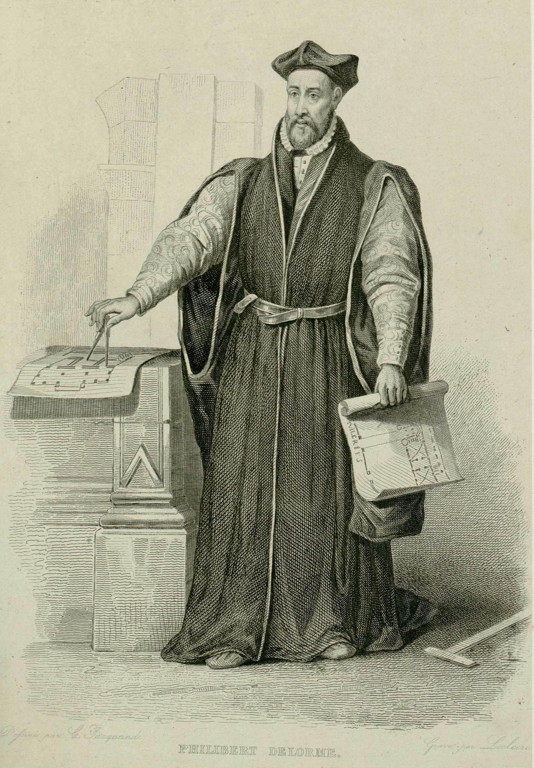 Portrait de Philibert Delorme